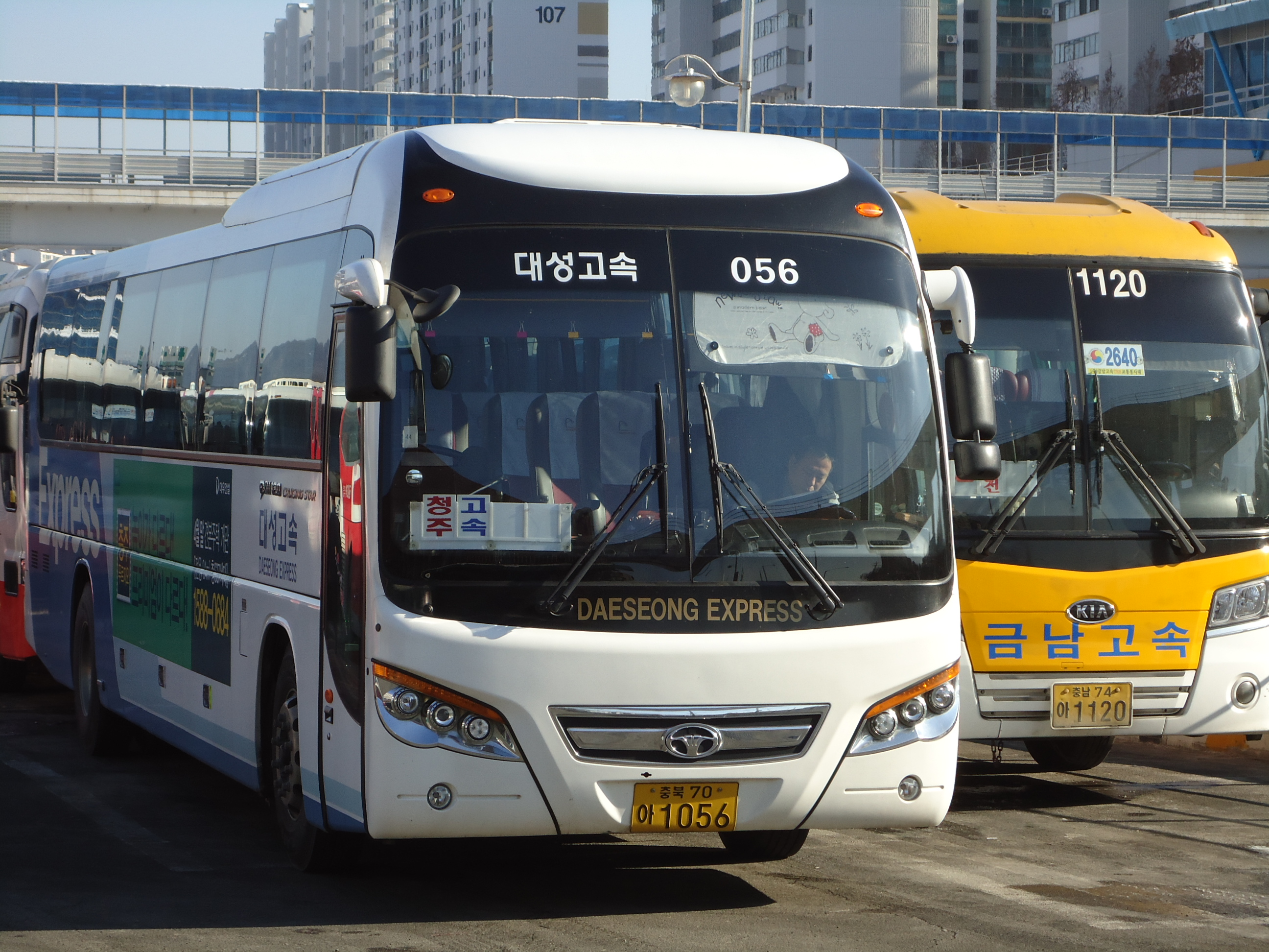 대성고속 FXⅡ120. 의정부-청주(의정부 시외, 고속버스터미널에서 촬영)